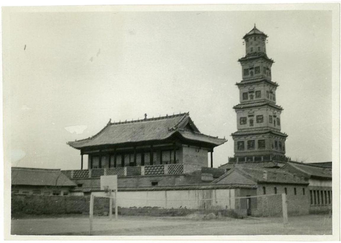 大云寺砖塔-山西临汾